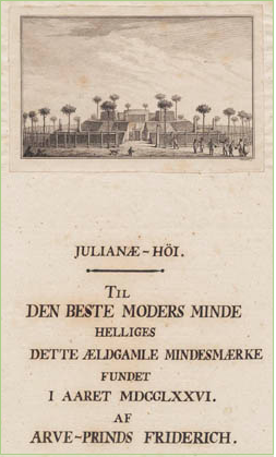 Julianehøj - titelblad. (1778). Swanes datering - Julianehøj ved Jægerspris Slot